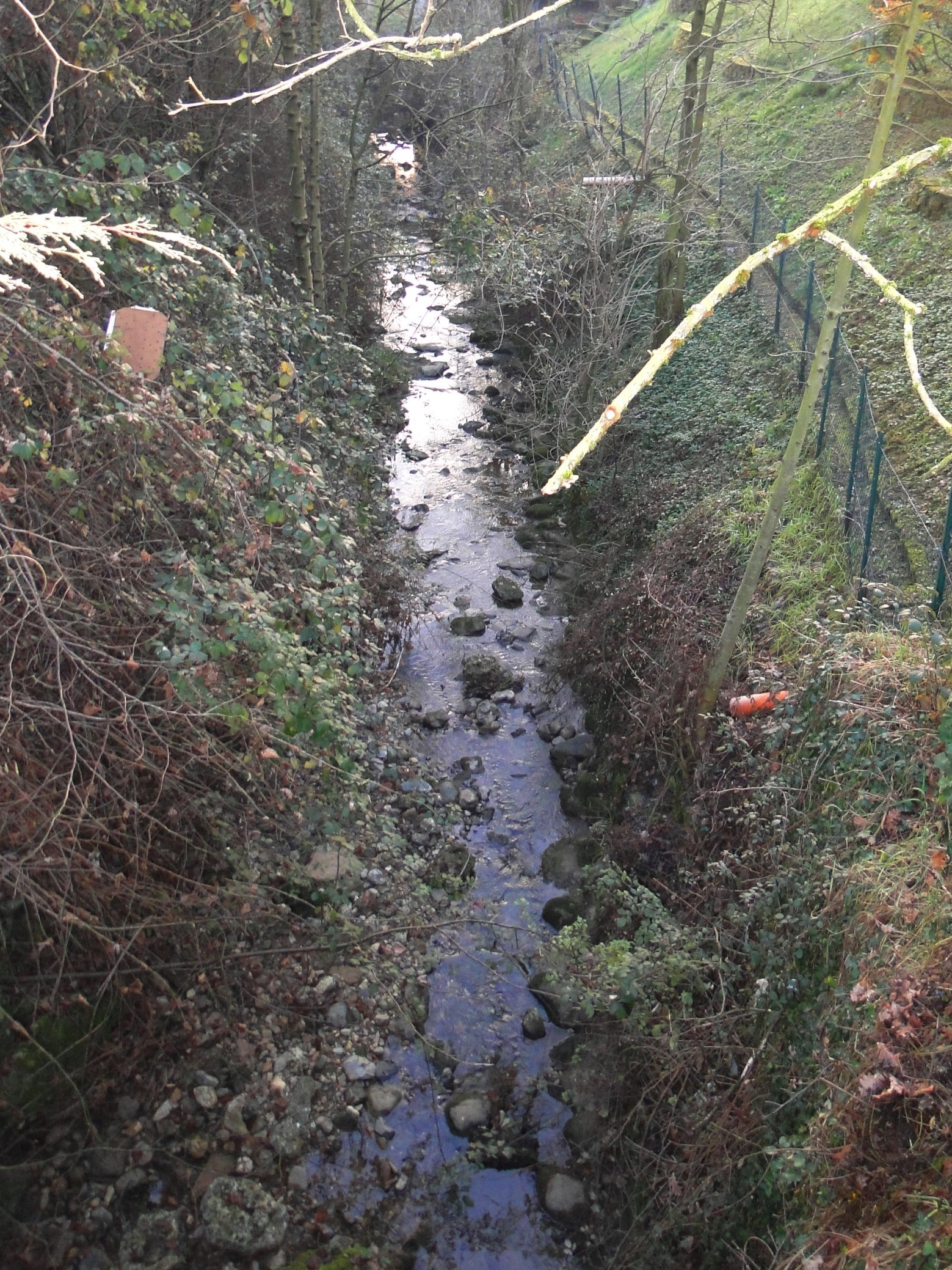 Torrente Re. Cazzano Sant'Andrea (BG). Italy